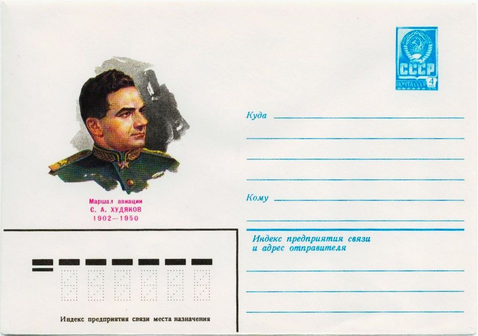 Маркированный конверт почты СССР Маршал авиации Сергей Александрович Худяков. Номер по каталогу: 15281. Номер по каталогу Лапкина А. А.: 81-542